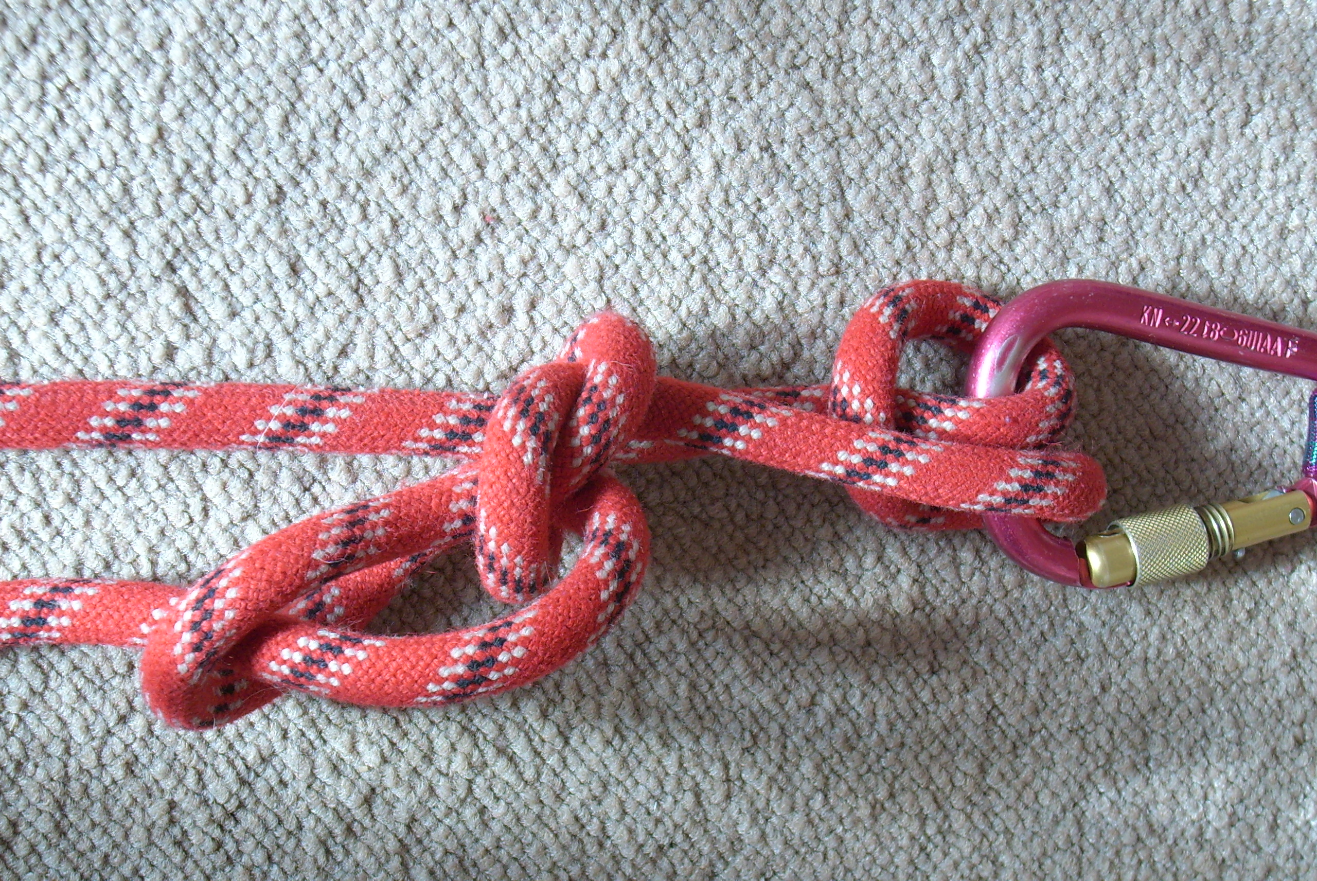 Schleifknoten, gesichert mit Ende durch Schlaufe gezogen